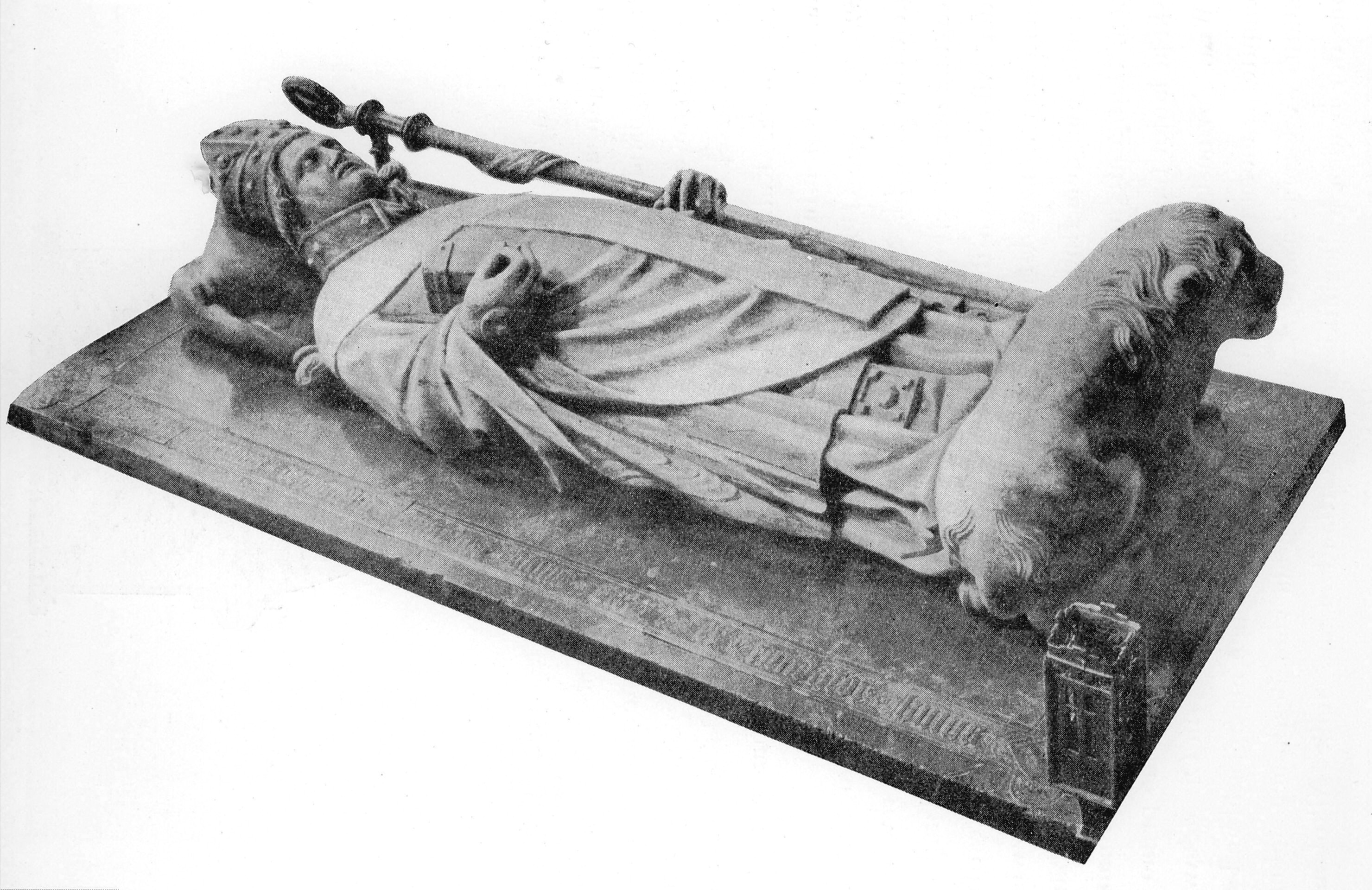 Nagrobek Przecława z Pogorzeli